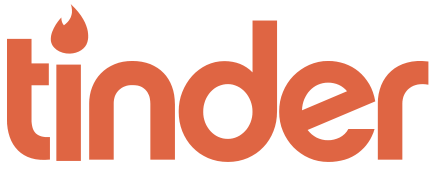 Logo von Tinder